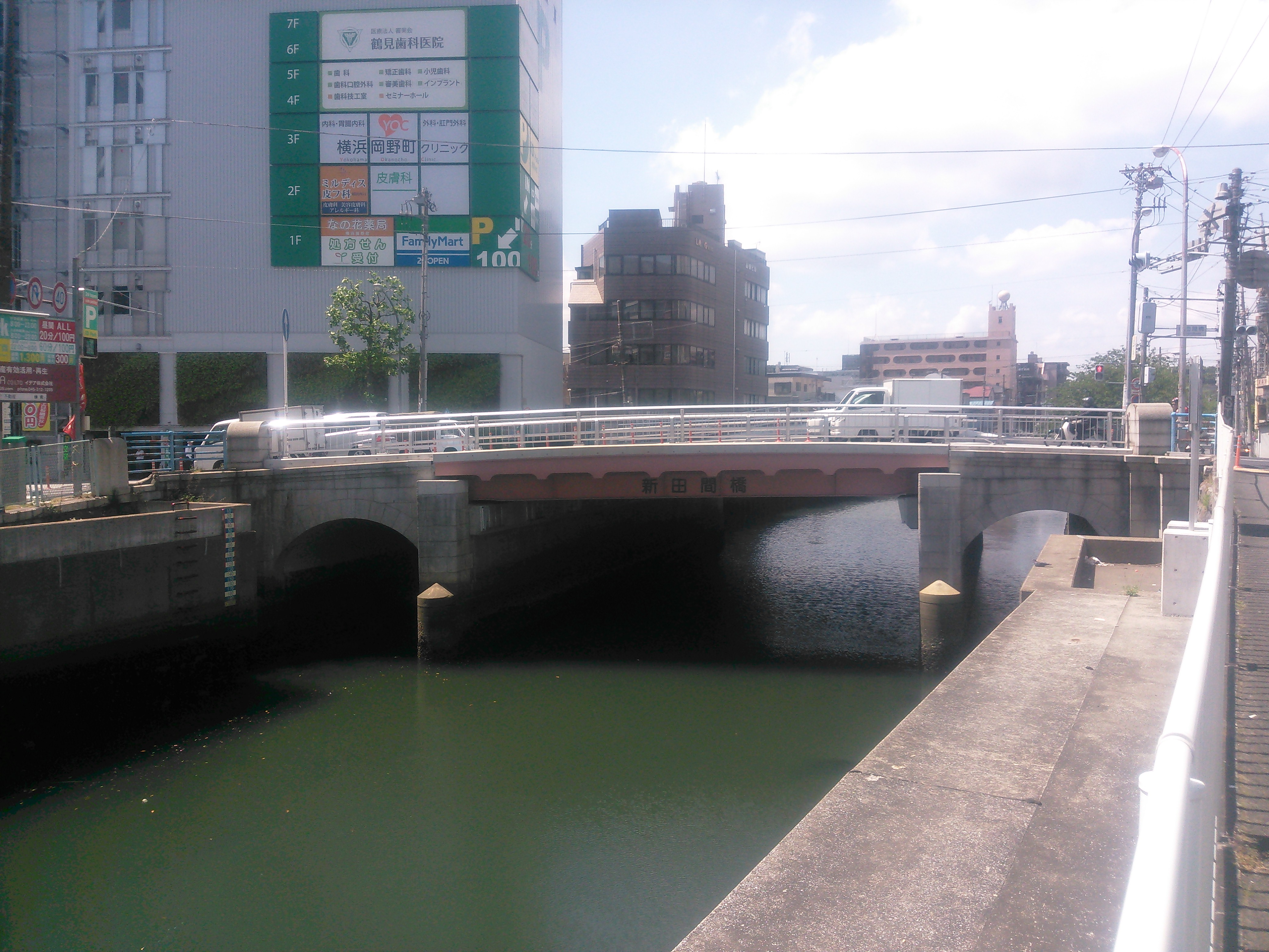 横浜市西区、新田間川に架かる新田間橋